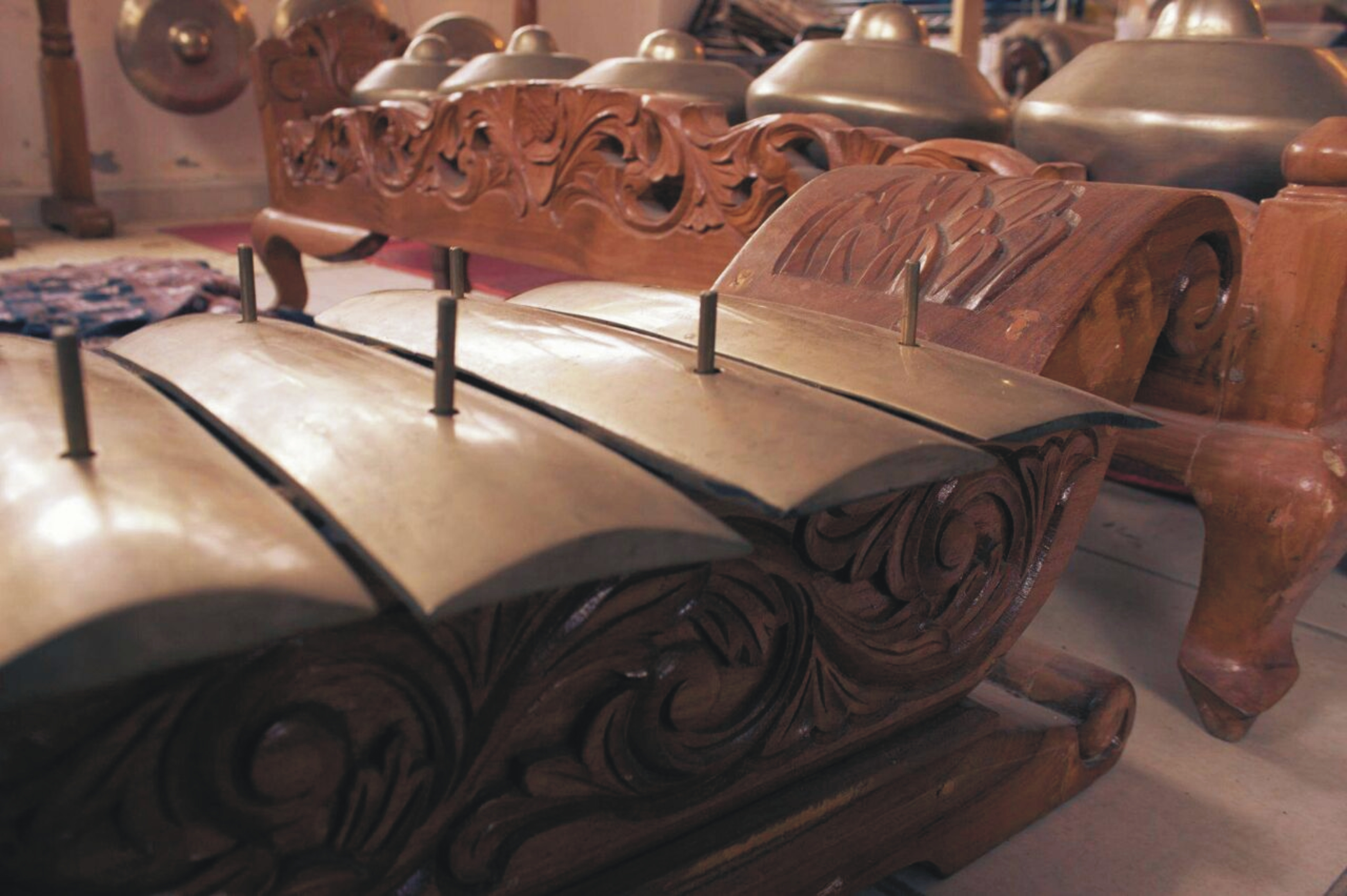 gamelan degung barudak del grupo Indra Swara en Mexico